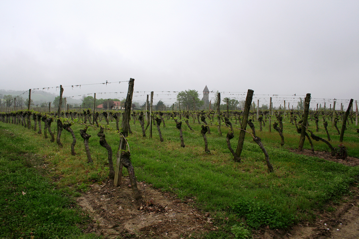 Côtes-de-Saint-Mont Vineyard in Sabazan, Gers, France.